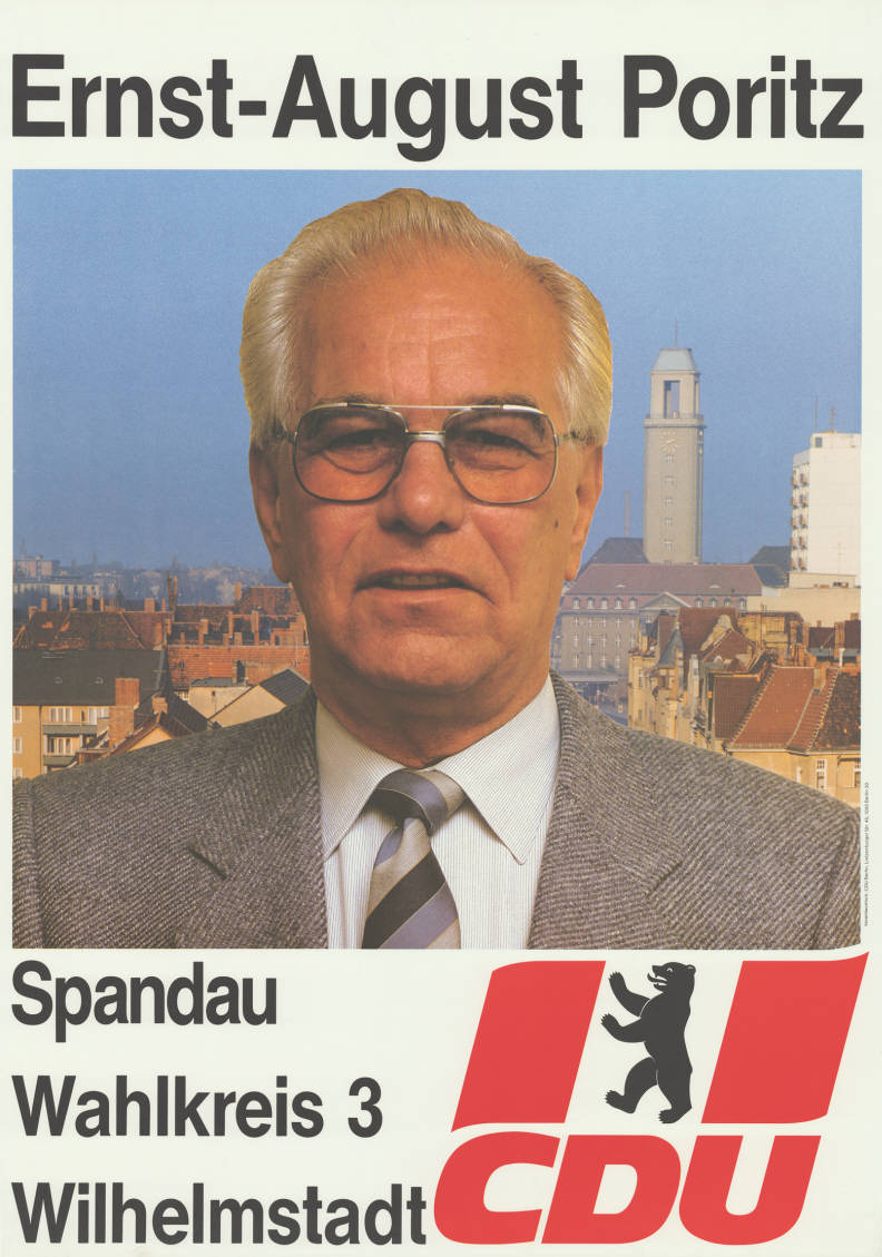 Ernst- August Poritz Spandau ... CDU Abbildung: Porträtfoto vor typischem Spandauer Stadthintergrund - Berliner Bär Plakatart: Kandidaten-/Personenplakat mit Porträt Auftraggeber: Verantw.: CDU Berlin Objekt-Signatur: 10-004 : 694 Bestand: Plakate zu Abgeordnetenhauswahlen Berlin (10-004) GliederungBestand10-18: Plakate zu Abgeordnetenhauswahlen Berlin (10-004) » CDU Lizenz: KAS/ACDP 10-004 : 694 CC-BY-SA 3.0 DE